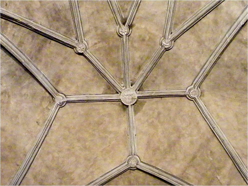 voûte du choeur église de Fontenoy-le-Château